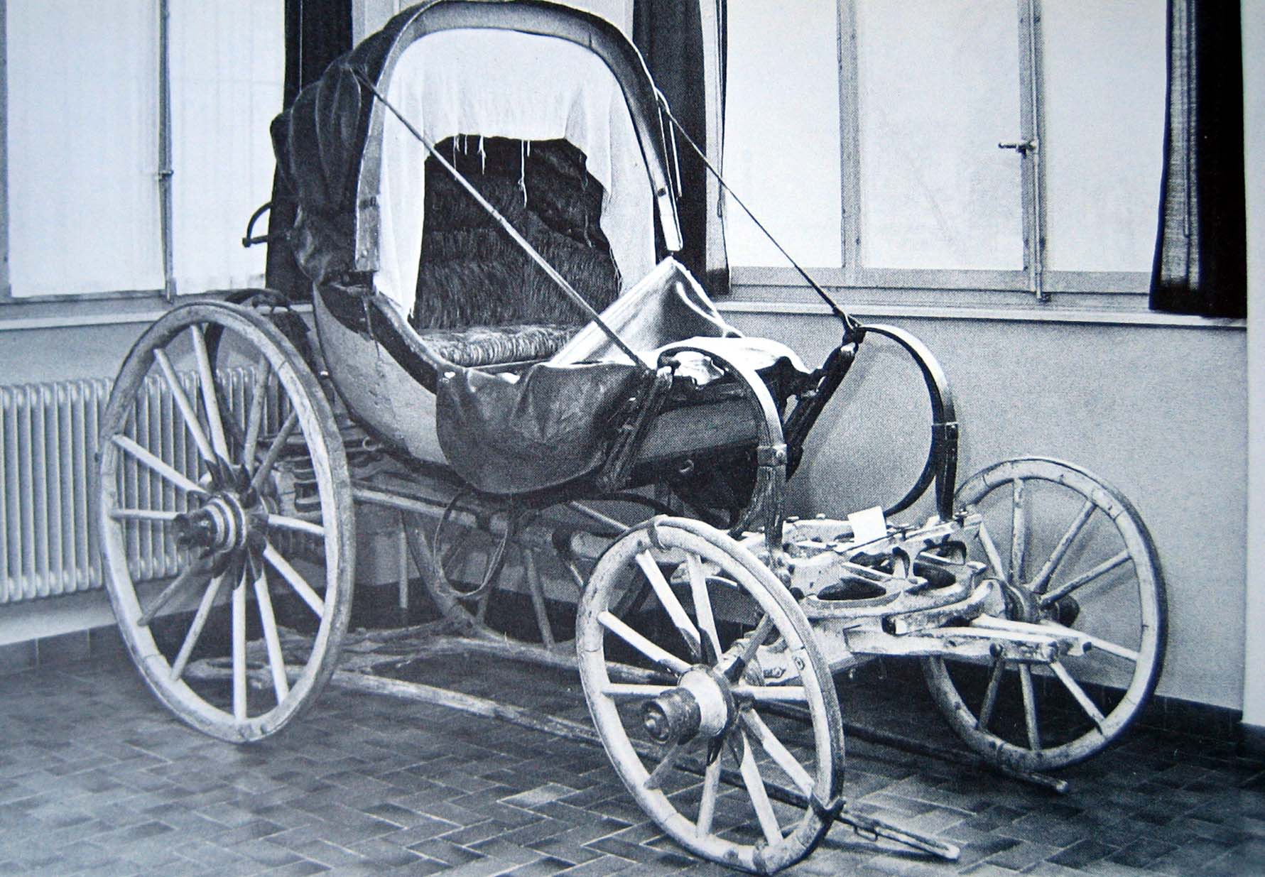 zweiplätziger Gotthardpostwagen, im Einsatz ab 1830, heute PTT-Museum in Bern